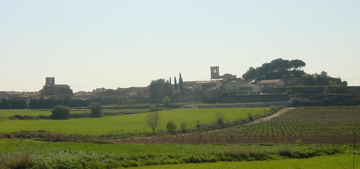 Vista panoramica de Banyeres del Penedès Penedesenc